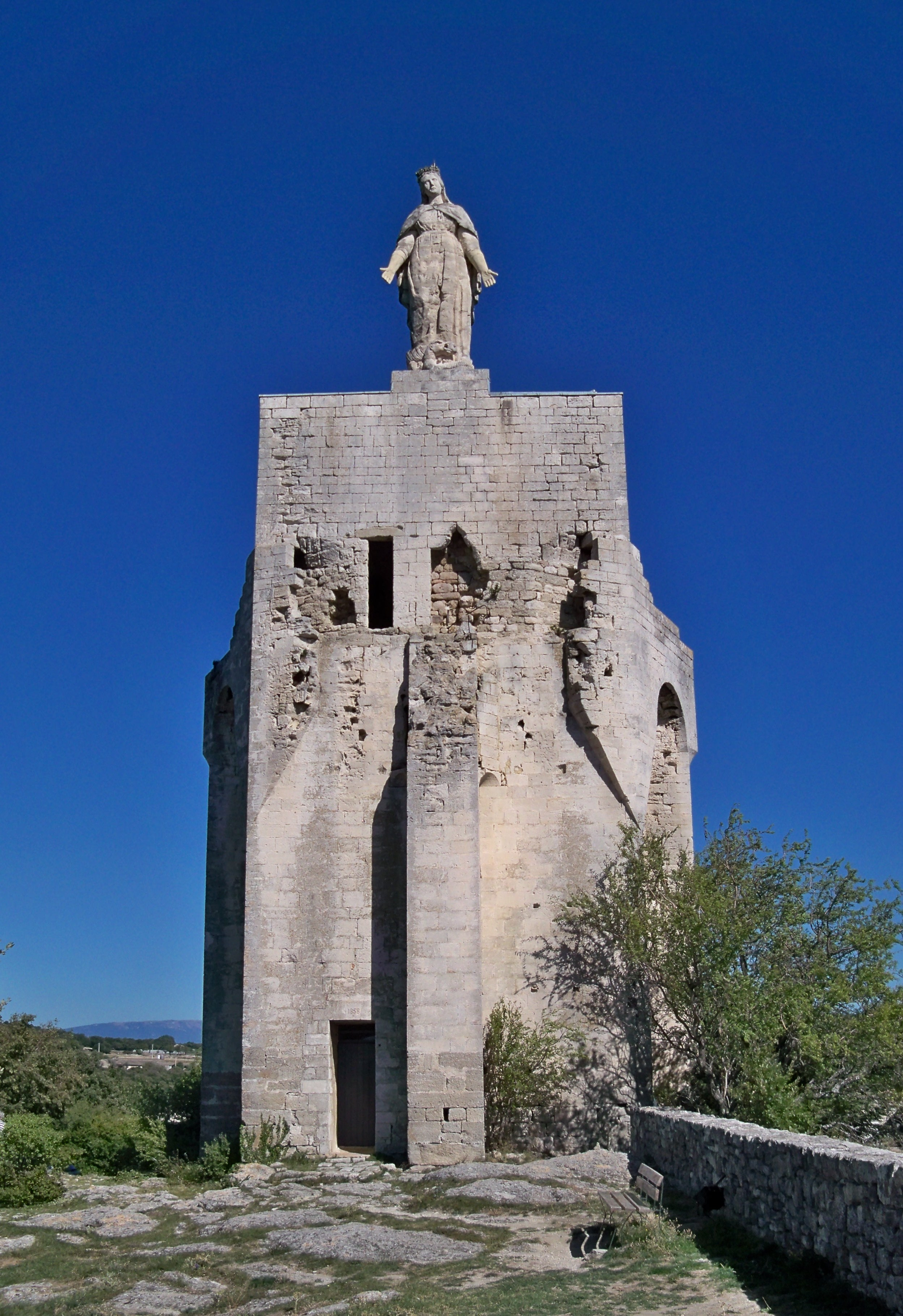 Tour-donjon de Clansayes, (Classement, 2006) .